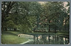 Dit is een foto of ansichtkaart van de Haarlemmerhout uit 1910. De foto is eigendom van het Archief Kennemerland en kan vrij gebruikt worden, vanwege de ouderdom. De auteur is niet bekend.